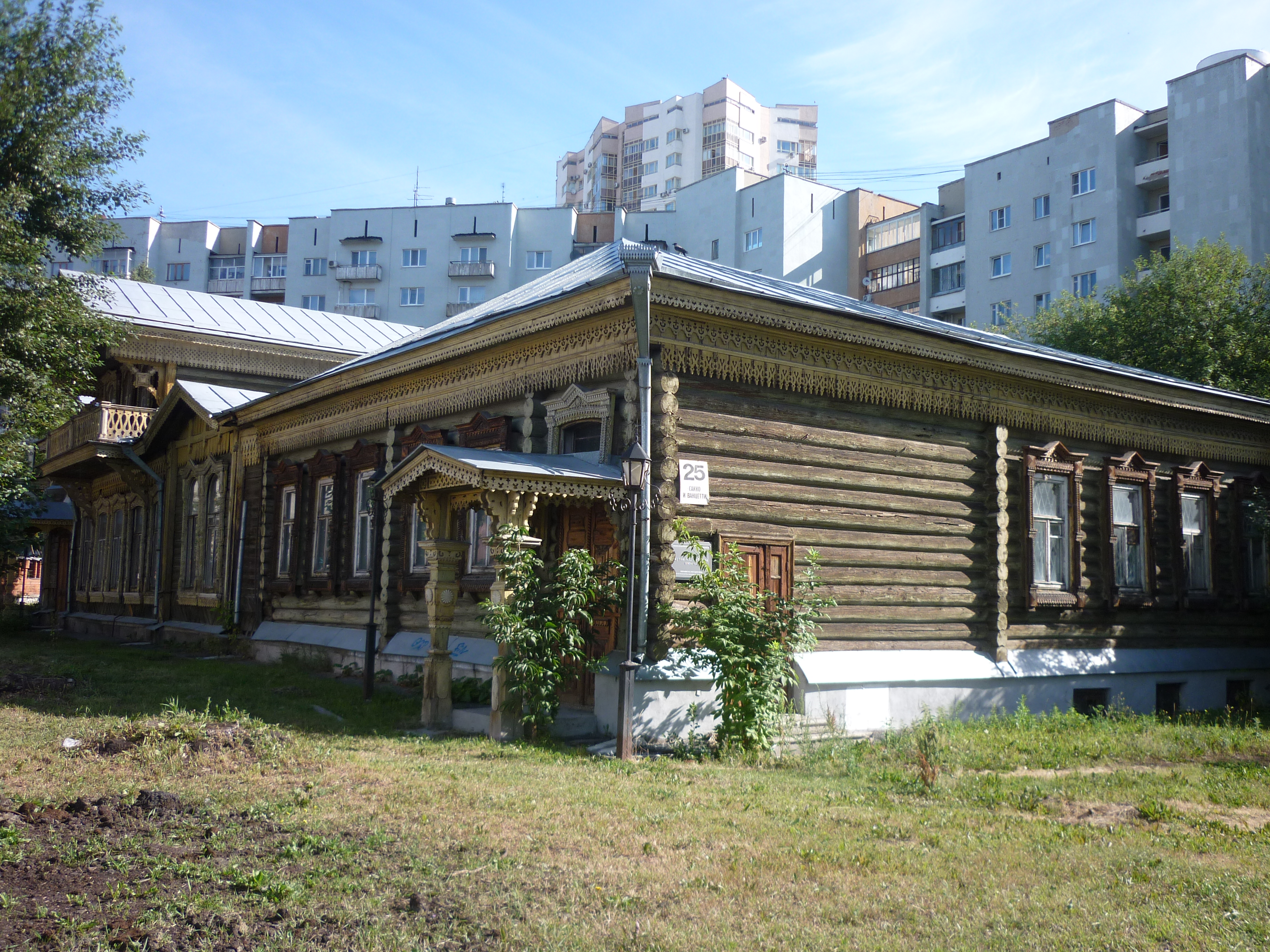 Сакко и Ванцетти дом 25 Екатеринбург 56.8395666, 60.5874015